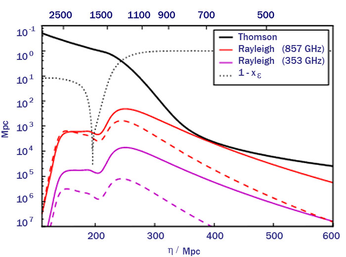 Opacitás, Thomson